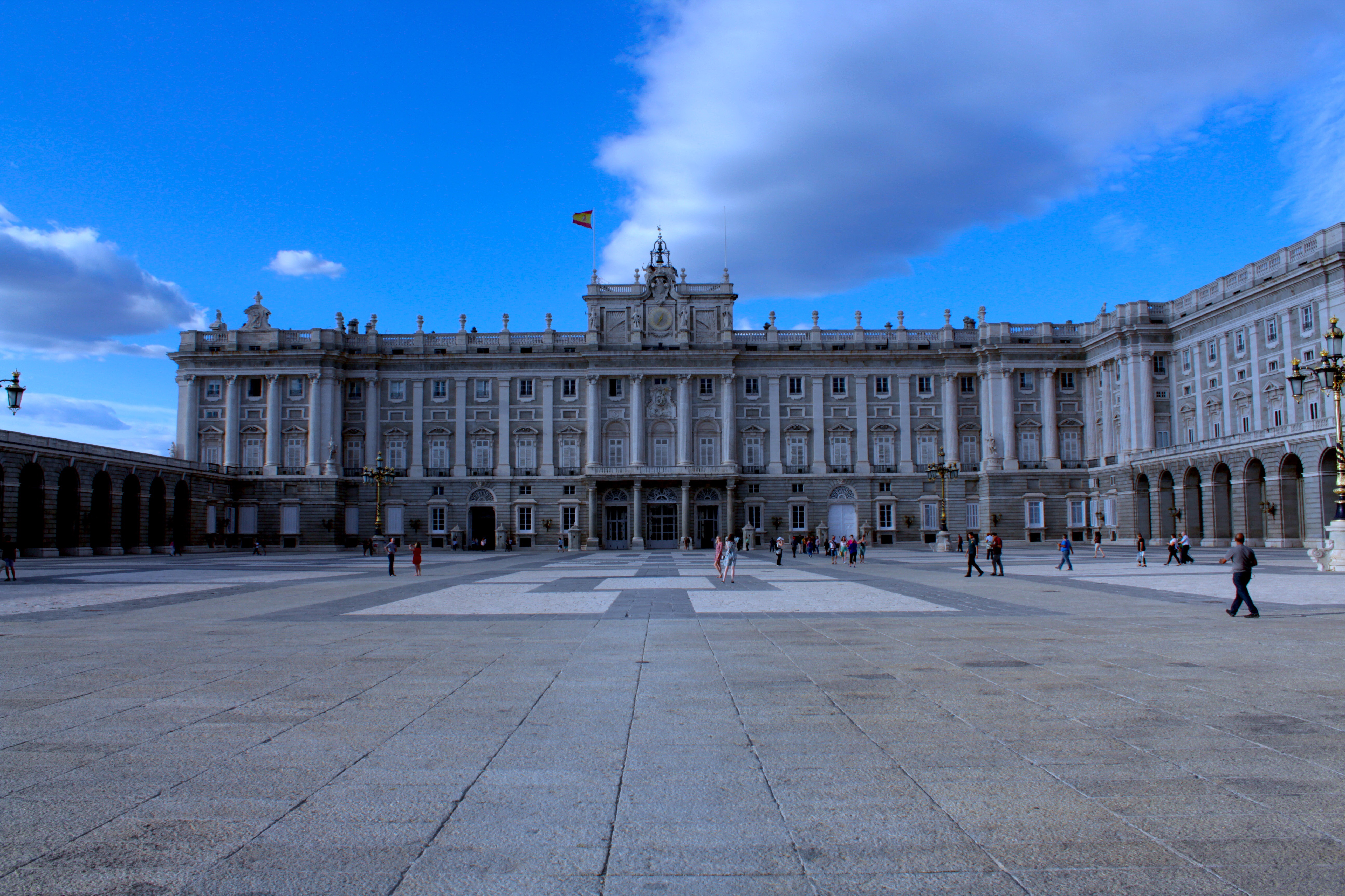 Veduta del Palazzo reale di Madrid